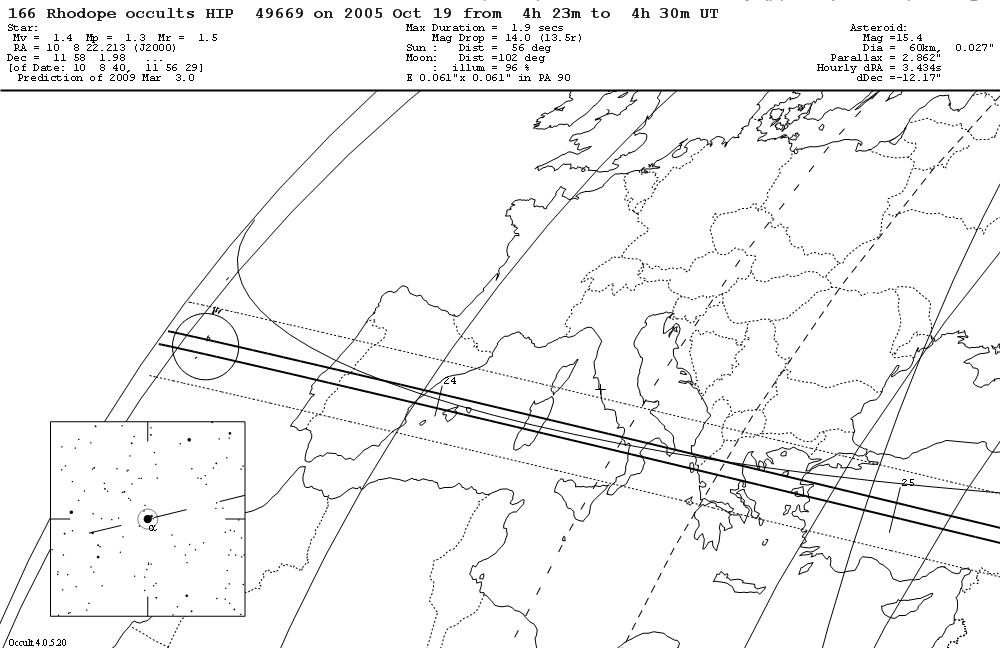 Asteroide 166 Rhodope occulta la stella Regolo il 19 ottobre 2005. File da me ottenuto direttamente dall'uscita grafica del freeware Occult 4.05.20 della International Occultation Timing Association.